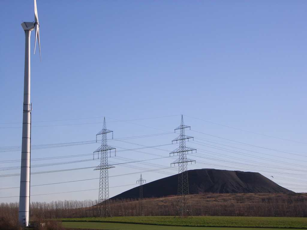 Halde der Grube Emil-Mayrisch in Baesweiler zwischen Siersdorf und Puffendorf (Westseite) mit Windkraftanlage, Strommasten und Gleitschirmsegler; Freileitungen 380 kV, Bahnstrom und 110 kV (links nach rechts)